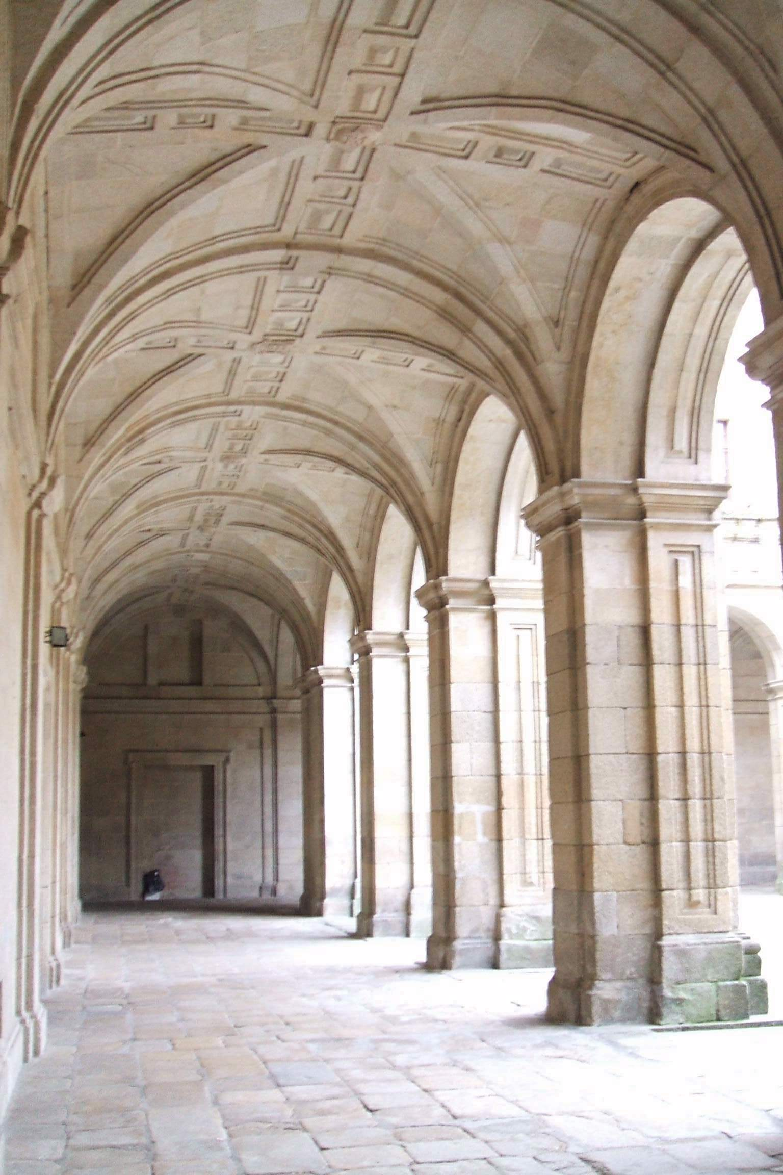 Monforte de Lemos - Colegio de Nuestra Señora de la Antigua (PP Escolapios), claustros